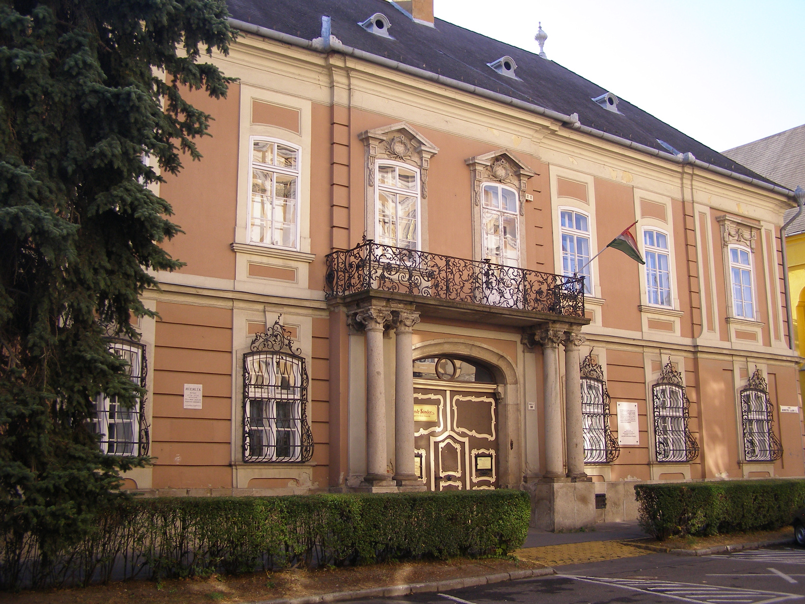 Nagypréposti-palota (Bródy Sándor Megyei- és Városi Könyvtár) (Eger, Kossuth Lajos u. 16.) This is a photo of a monument in Hungary. Identifier: 5542